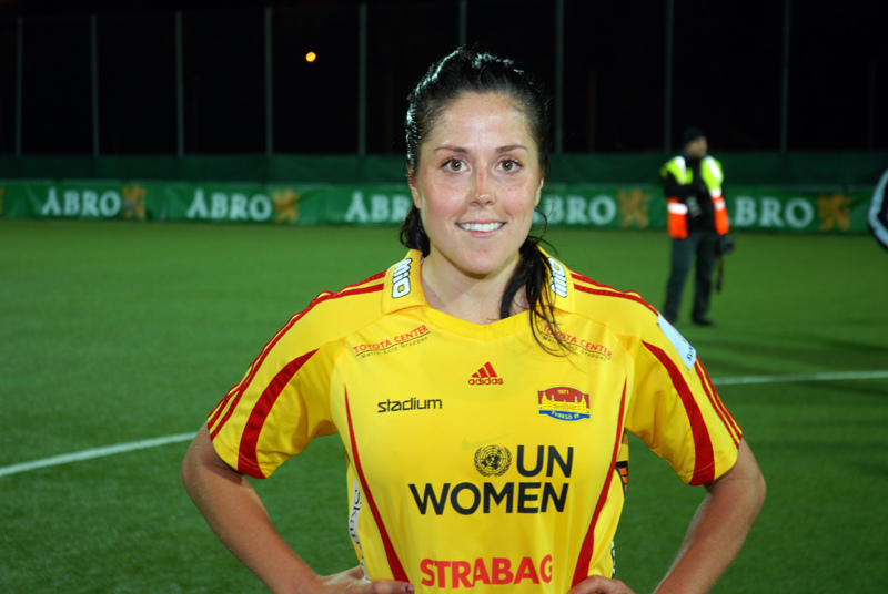 a_59_0166